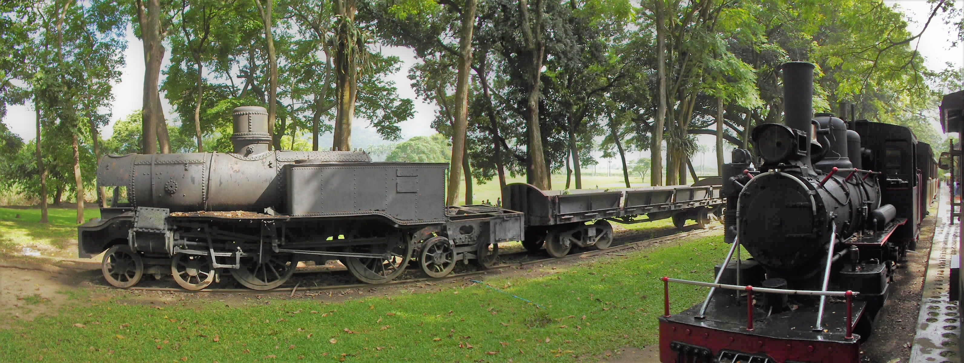 Locomotoras del Gran Ferrocarril Venezuela exhibidas en la antigua estación de trenes en lo que hoy es la Hacienda Santa Teresa,. en El Consejo - Aragua